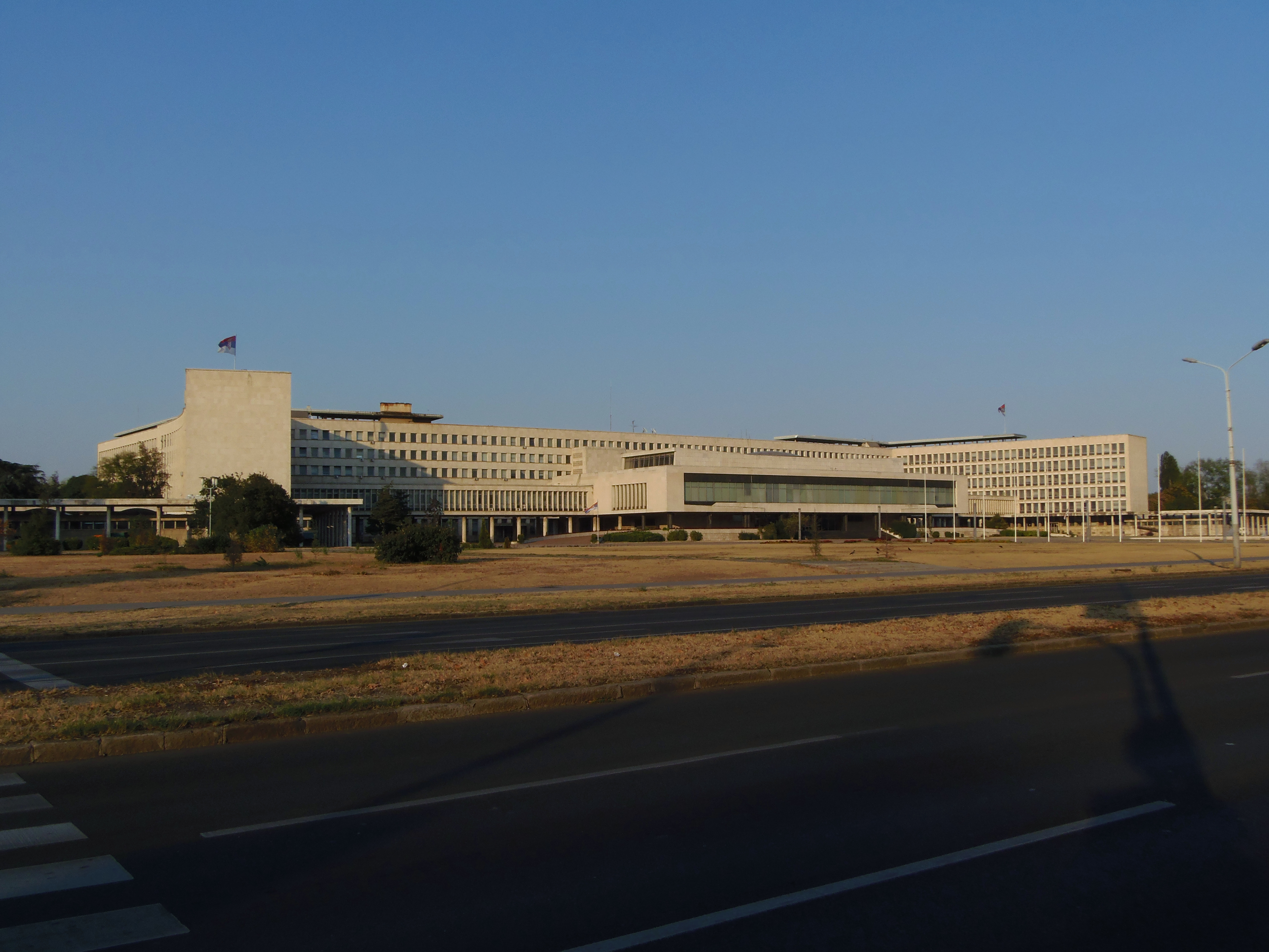 Палата "Србија", 2. септембра 2012.